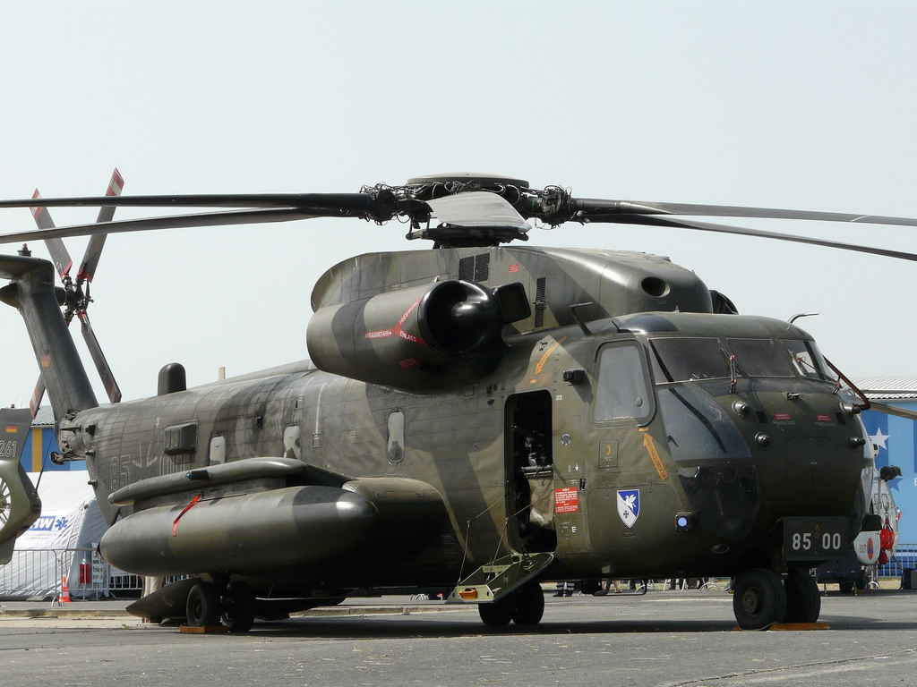 Sikorsky CH-53 GS des deutschen Heeres (Mittleres Transporthubschrauberregiment 25)